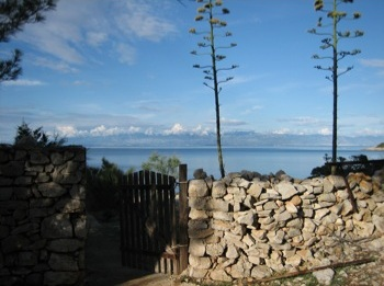 Velebit Mountain as seen from Sveti Petar Island, Northern Adriatic, Croatia. / Otok Sveti Petar, pogled prema Velebitu sa sjeveroistočne strane otoka.